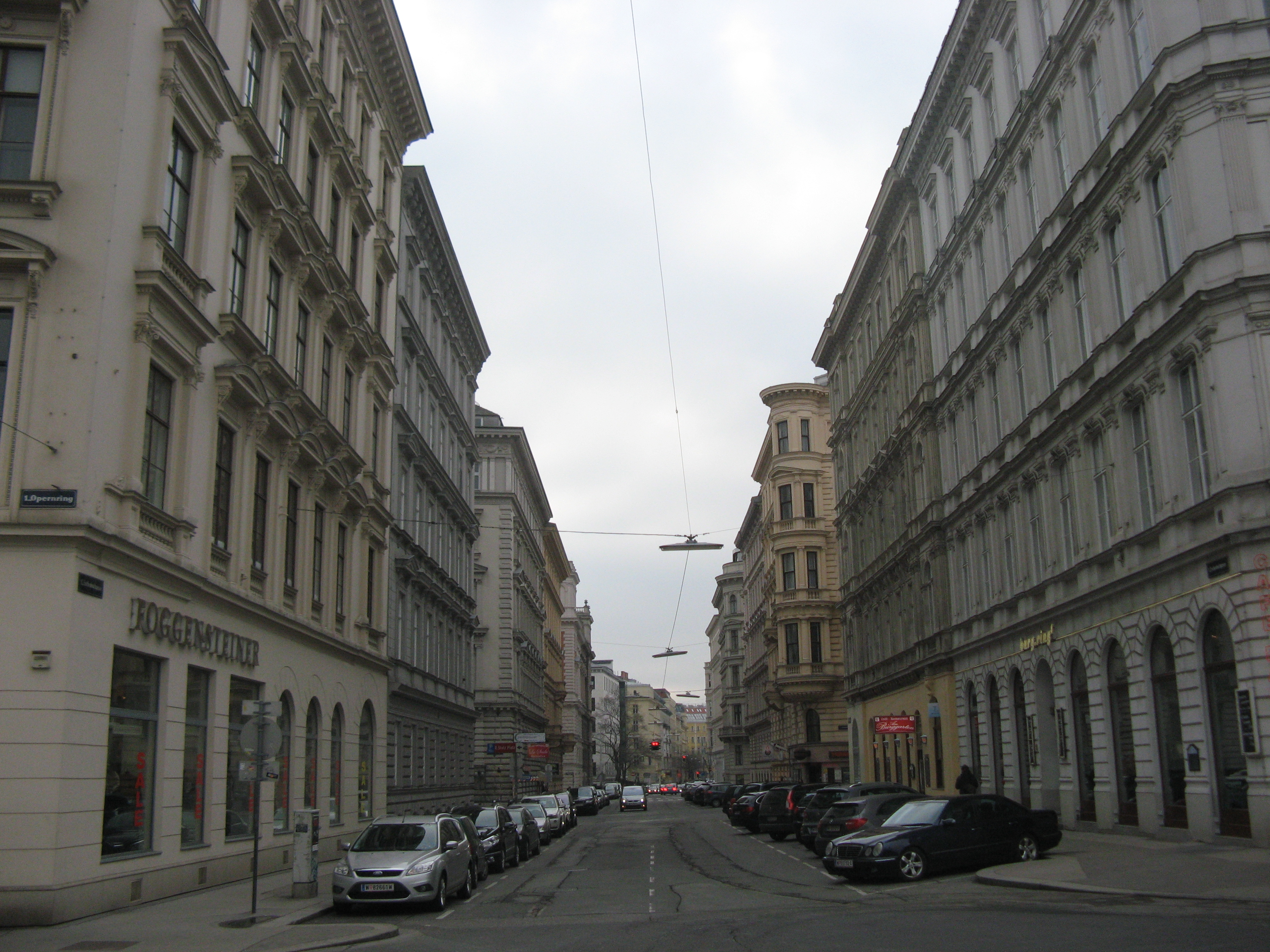 Eschenbachgasse vom Opernring aus, Wien-Innere Stadt